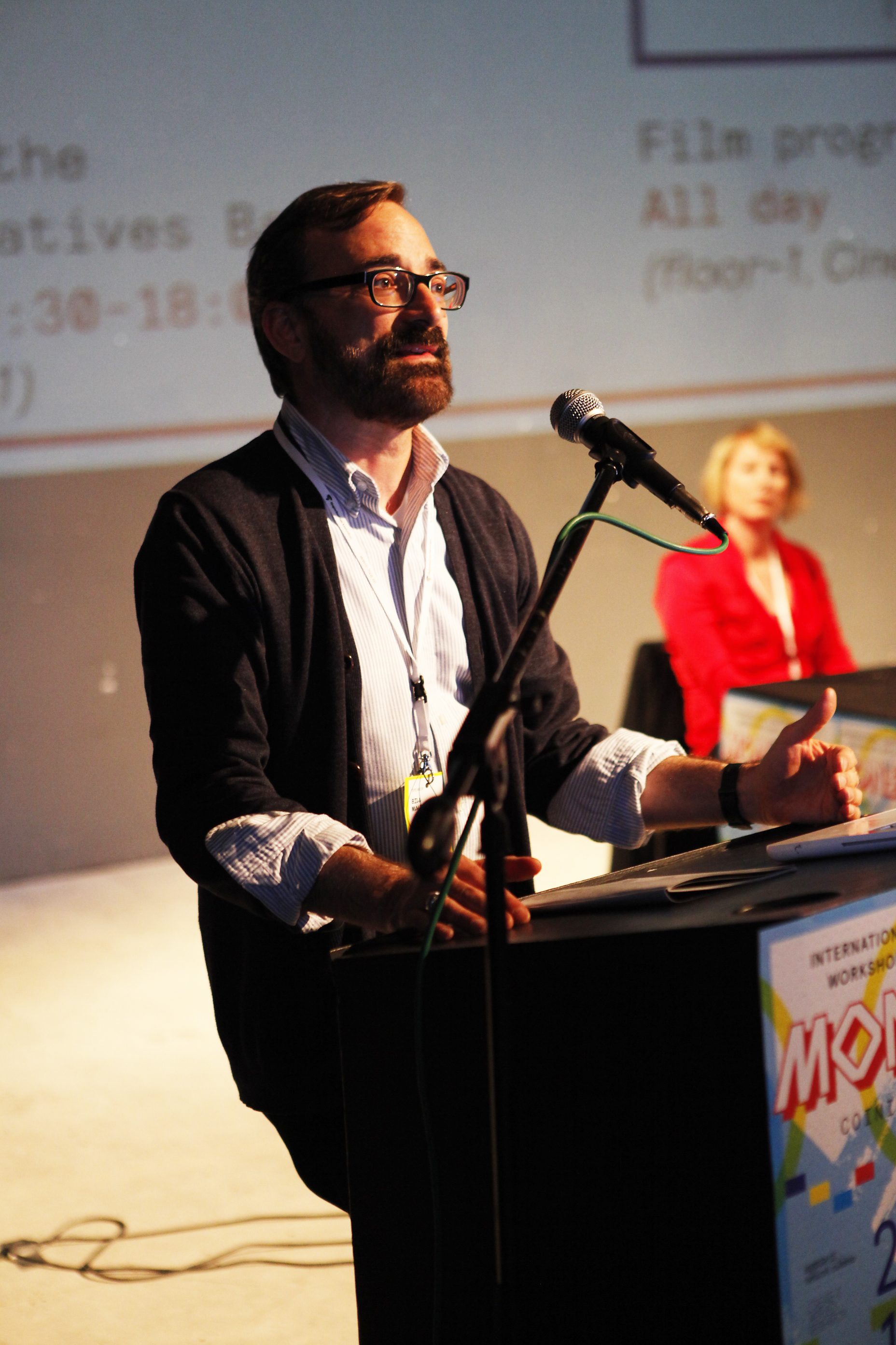 Bill Maurer